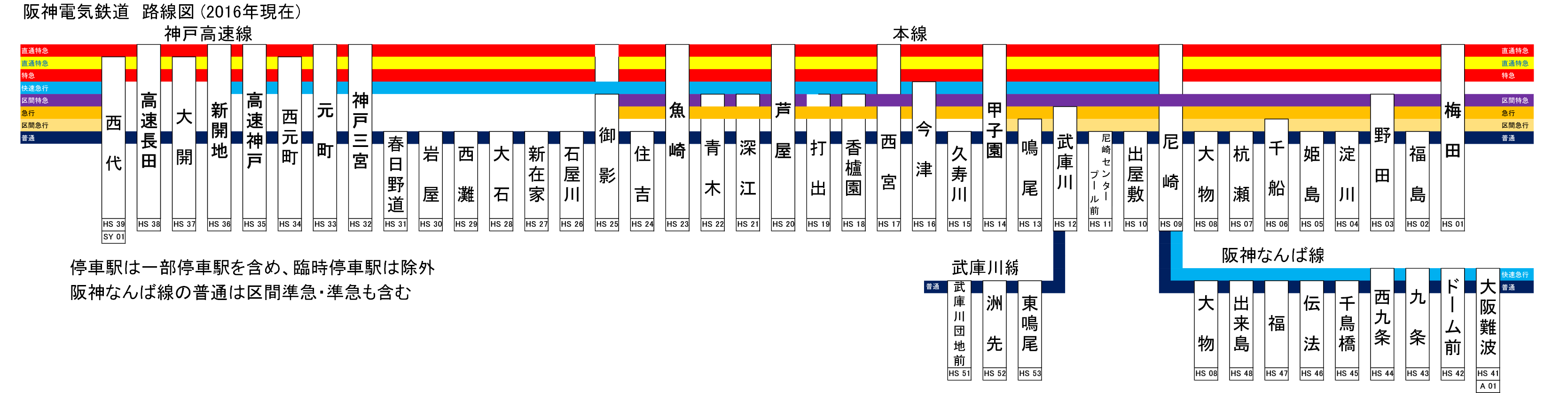 阪神電気鉄道路線図 2014年対応版